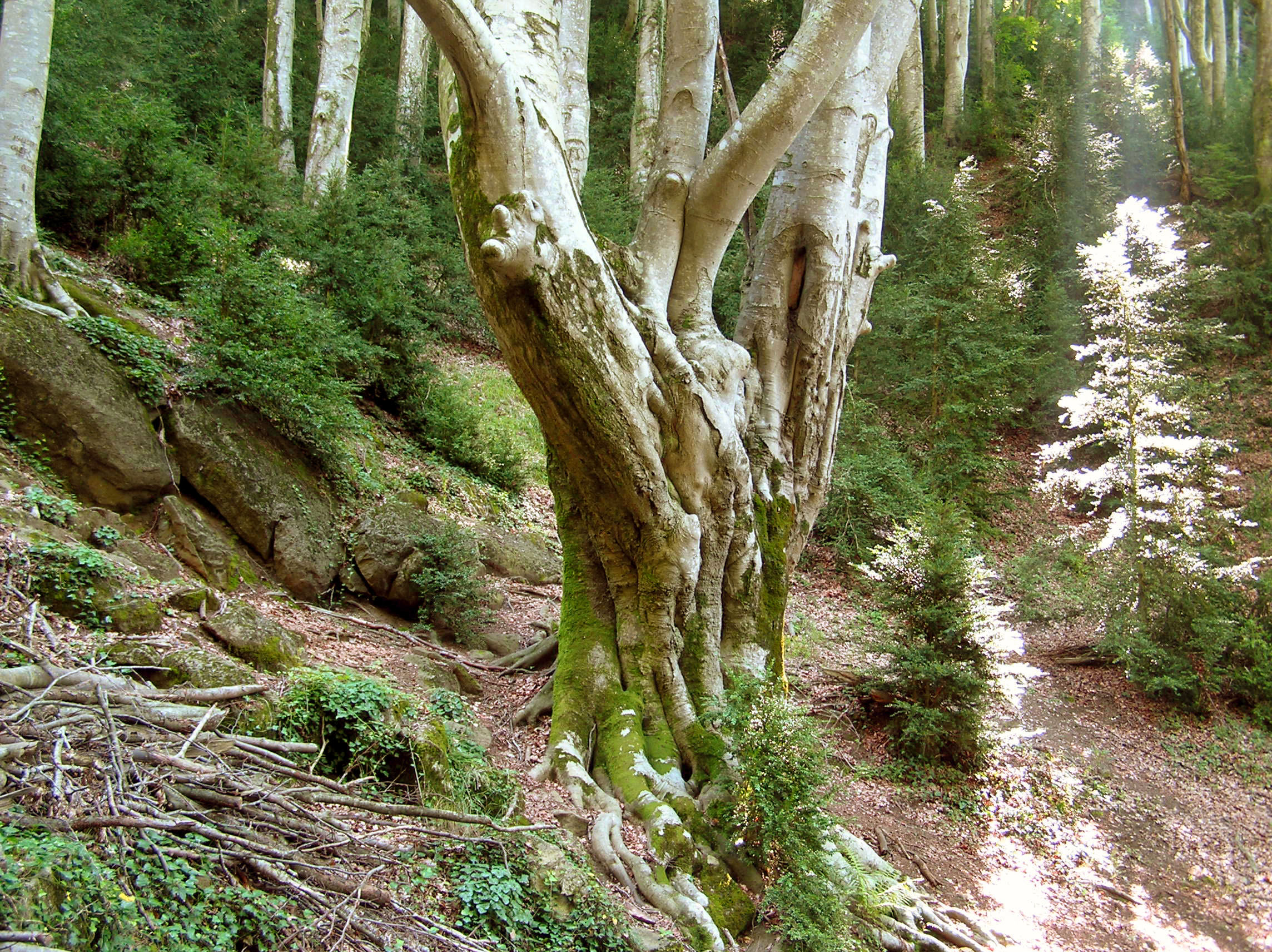 Foto del bosque de la Grevolosa